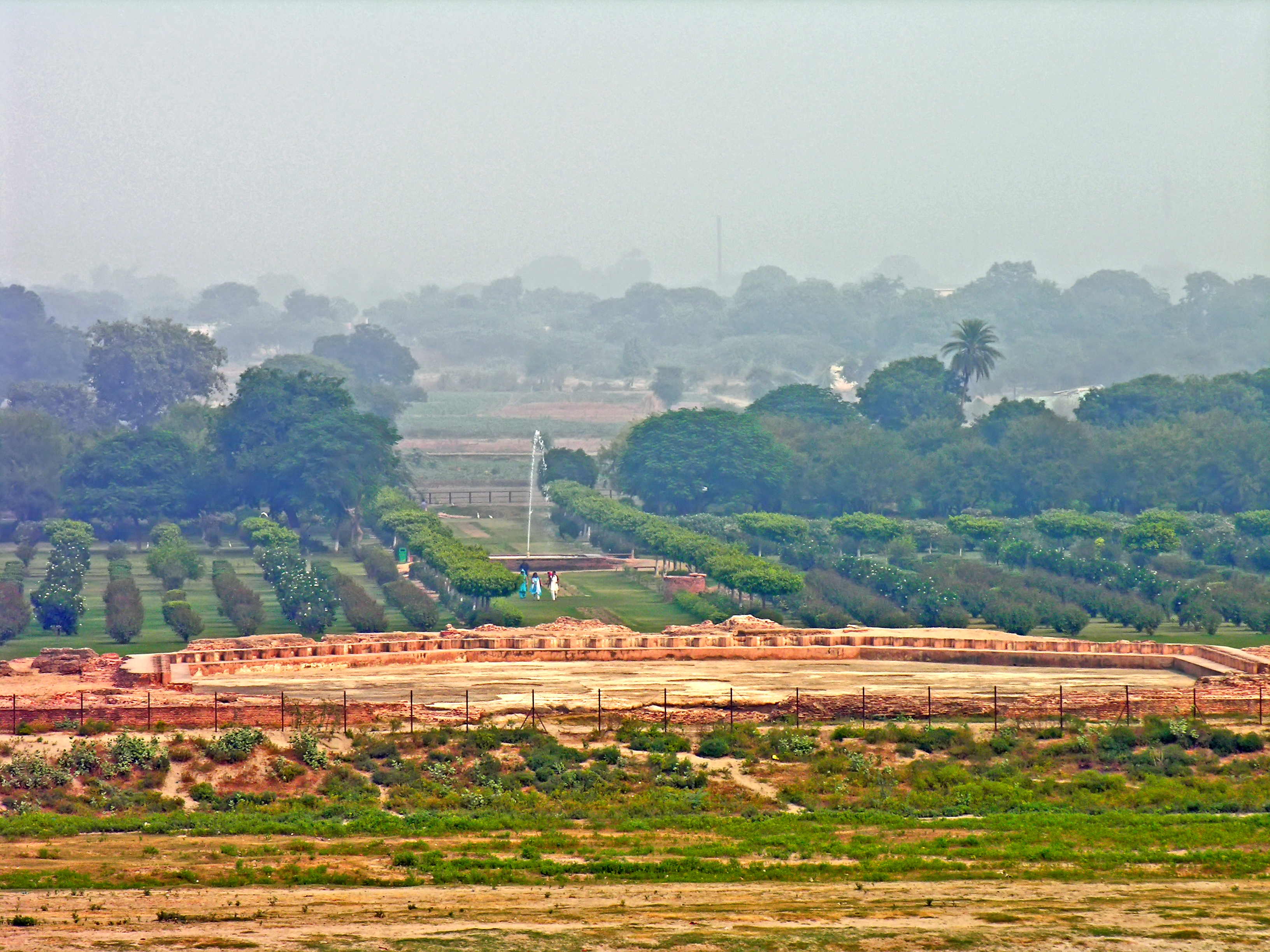 India-6194